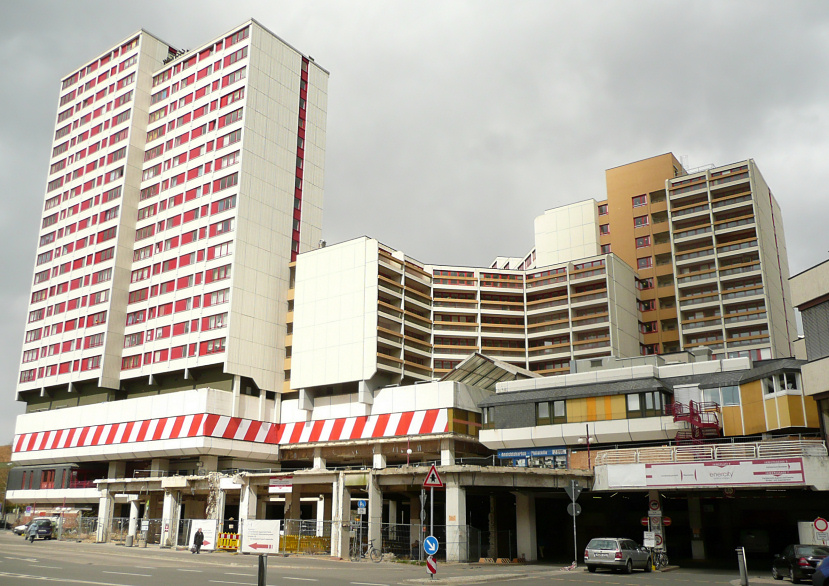 Ihmezentrum Hannover